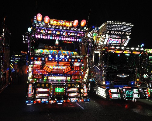 Dekotora Así son los camiones que se van al cielo Léa el post en Big Fenomeno haciendo click acá